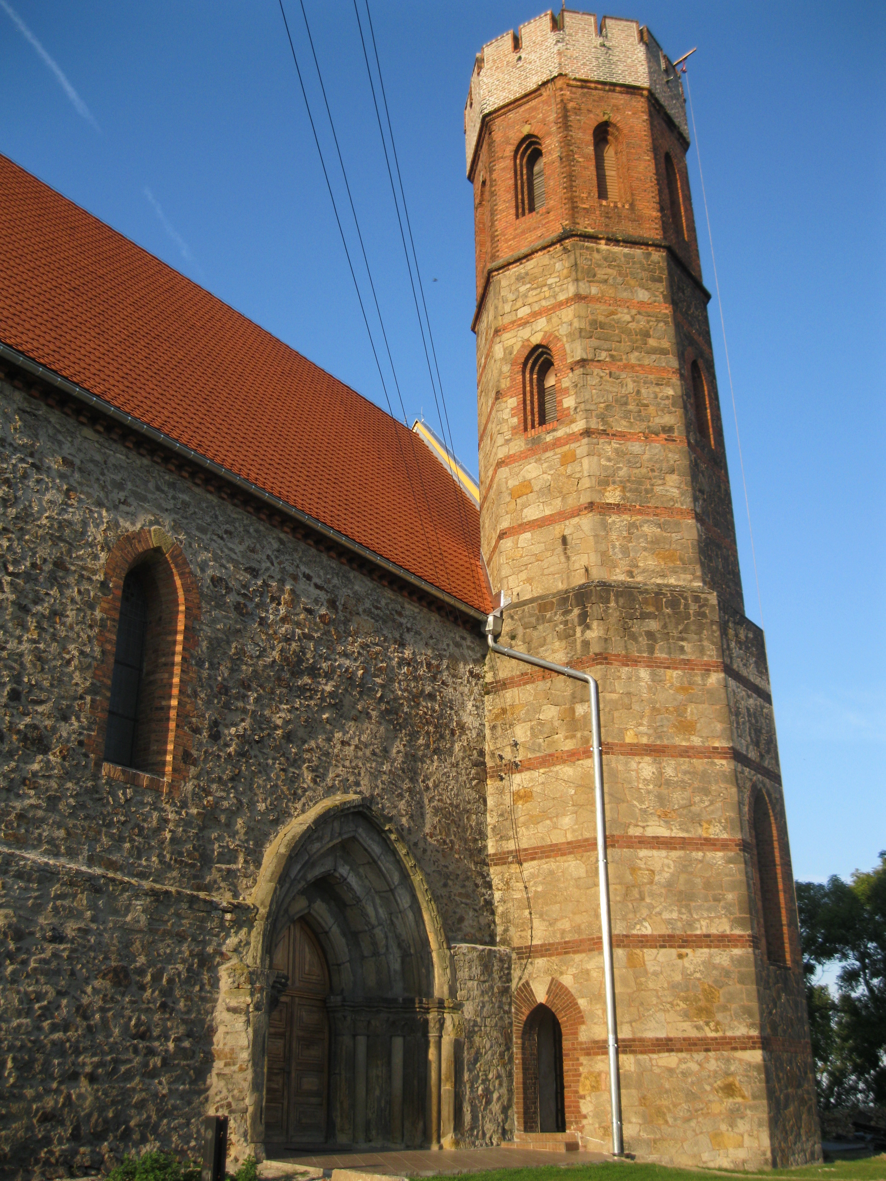 Pożarzysko - kościół p.w. św. Józefa (zabytek nr A/1680/204)